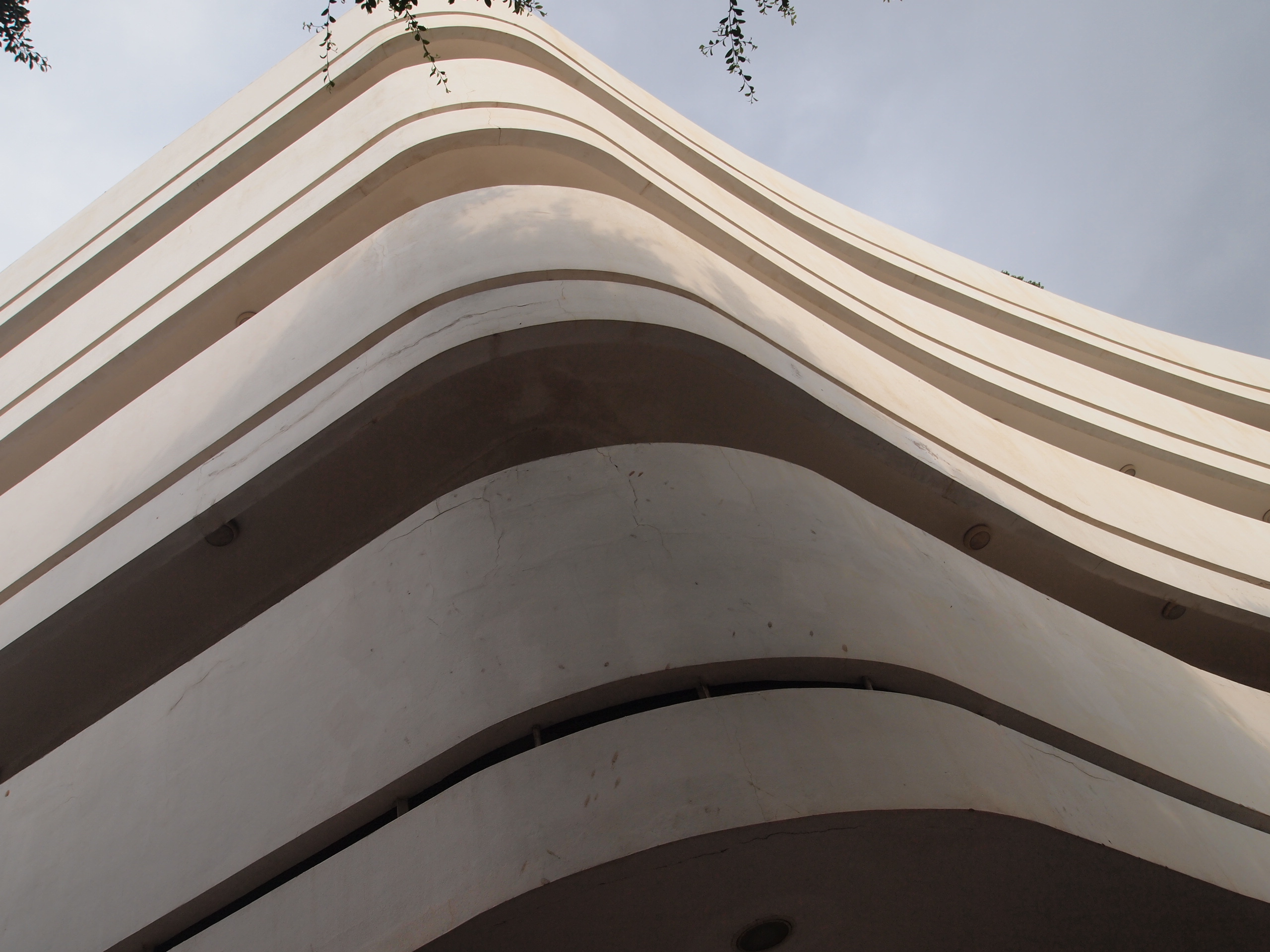 בניין קולנוע אסתר שבתל אביב נבנה בכיכר דיזנגוף בשנים 1938-1939. יזמי הבניין ובעליו היו הזוג אסתר ומשה נתנאל מראשוני יהודי עדן, שעלו לארץ ישראל מהעיר עדן בשנת 1924 והם ומשפחתם (מנחם משה) בנו בעיר כ 25 בניינים שרובם הוכרזו כבתים לשימור.